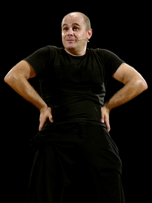 Valencian entertainer Xavi Castillo performing Pànic al Centenari in L'Olleria